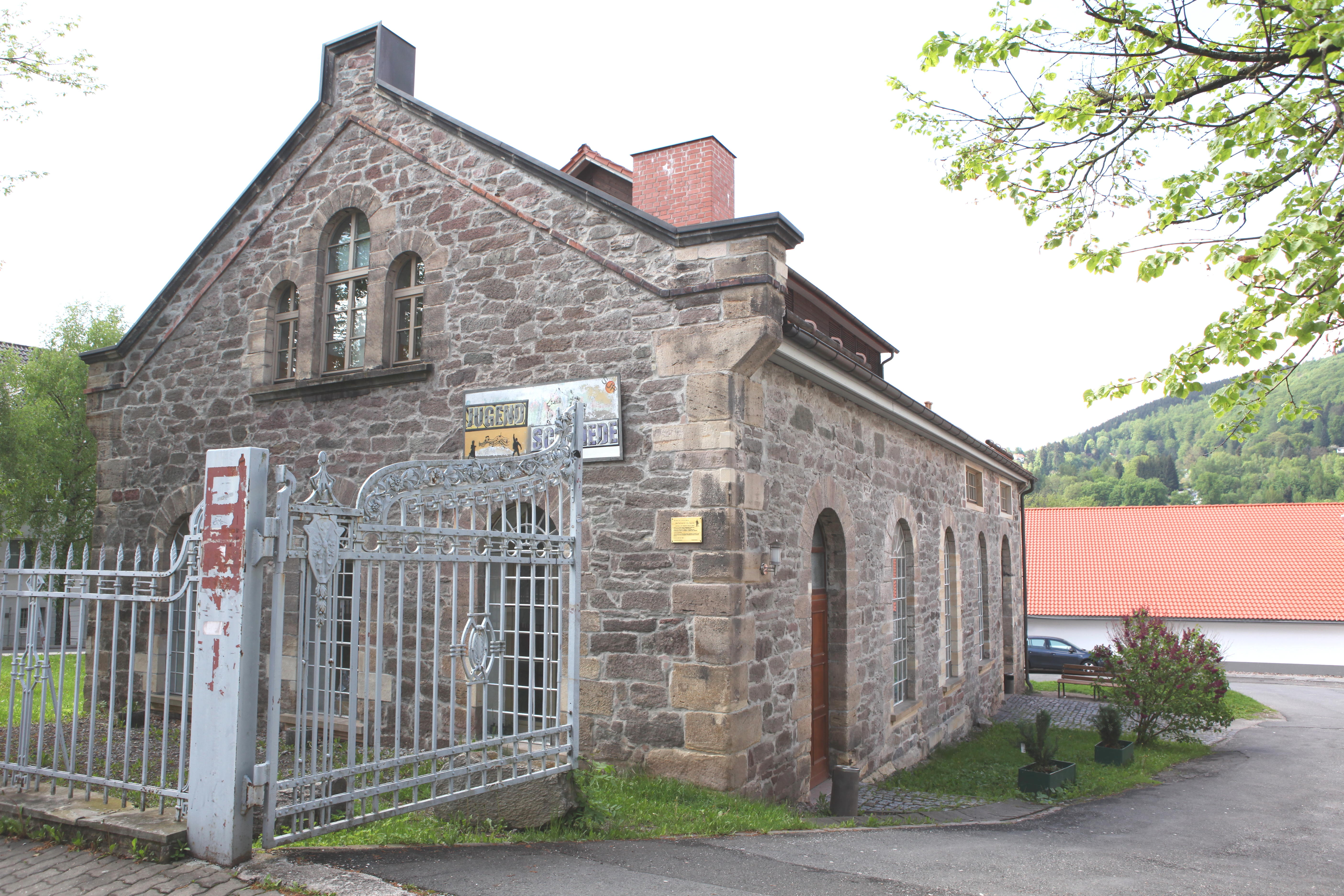 alte Schmiede, erstes Fabrikgebäude der 1840 gegründeten Waffenfabrik C.G Haenel in Suhl